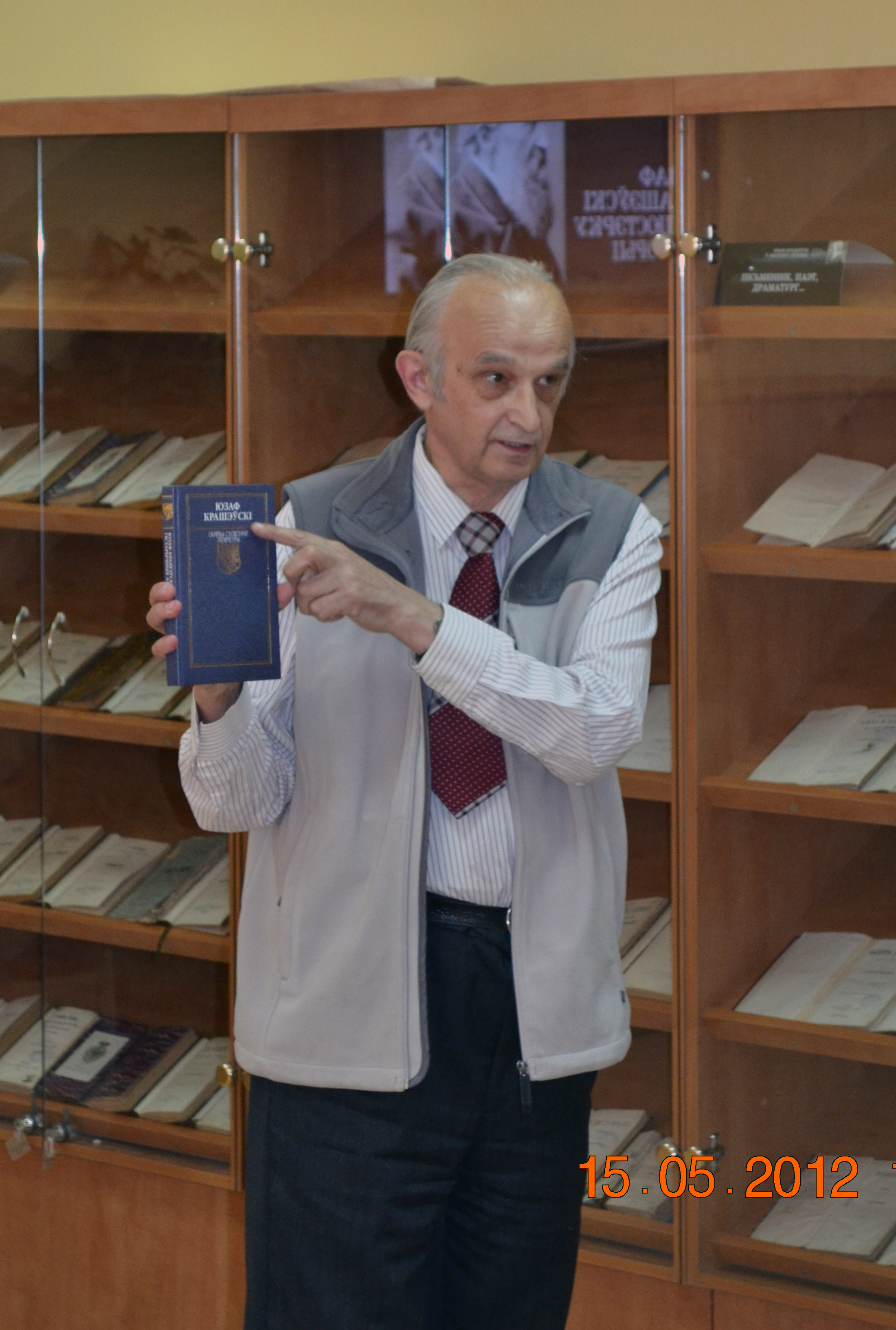 Беларуская (тарашкевіца): Міхаіл Кенька на кніжнай выставе «Юзэф Крашэўскі ў люстэрку гісторыі» ў Цэнтральнай навуковай бібліятэцы імя Я. Коласа НАН Беларусі.